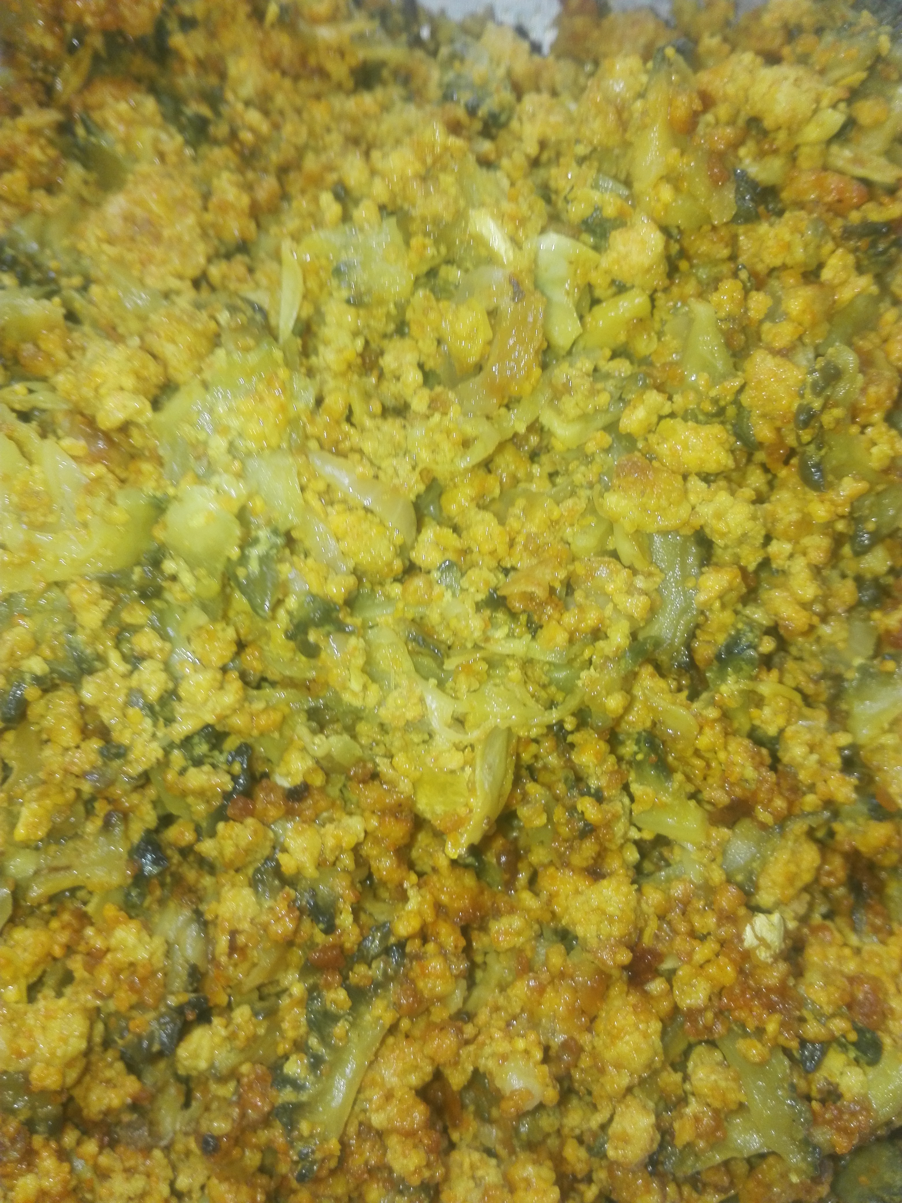 বাঙালী তরকারি। ভাতের সাথে খাওয়া হয়।